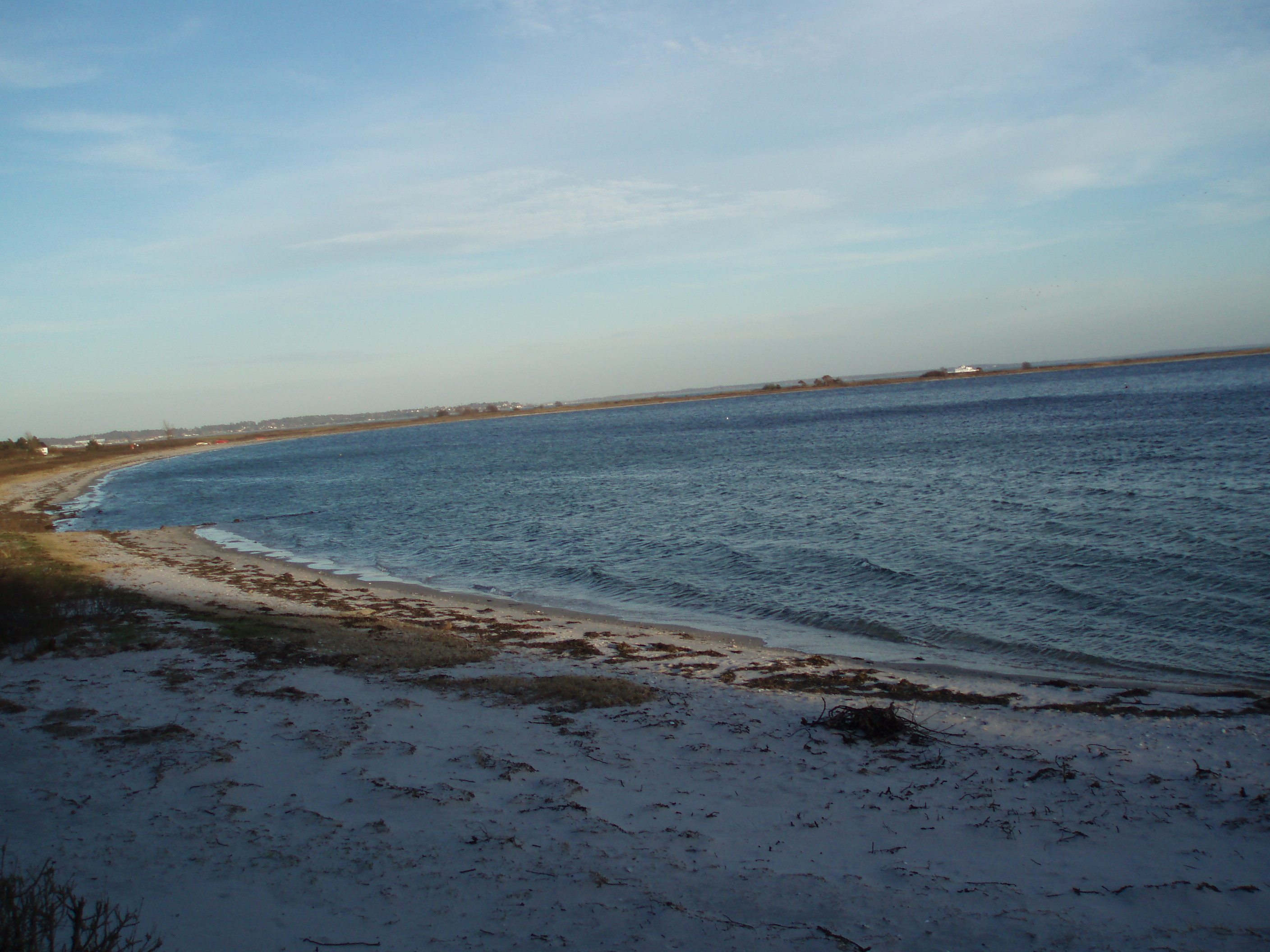 Skansehage (Rørvig)